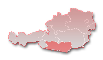 Bundesland Kärnten